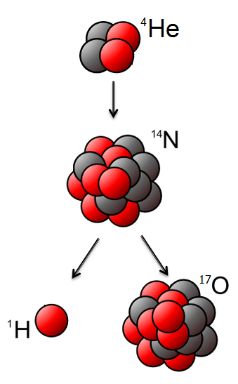 Representación de la primera transmutación de la materia, efectuada por Ernest Rutherford